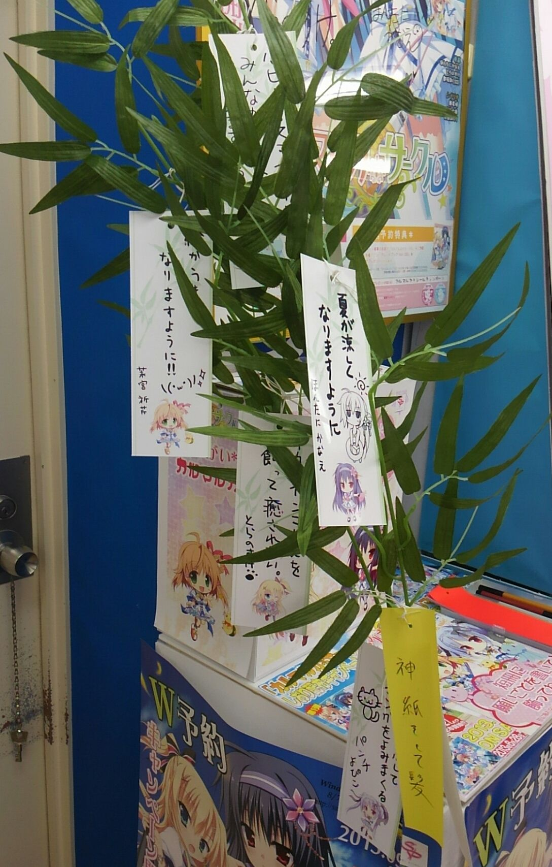 PCゲーム『カルマルカ*サークル』発売前に実施された、七夕企画「おねがい*カルマルカ」において使用された、短冊の付いた笹。ソフマップ横浜店にて撮影。著作物はなるべく小さく撮影し、笹をメインに撮影しています。著作権に関してはCOM:DM Japanを参照のこと。